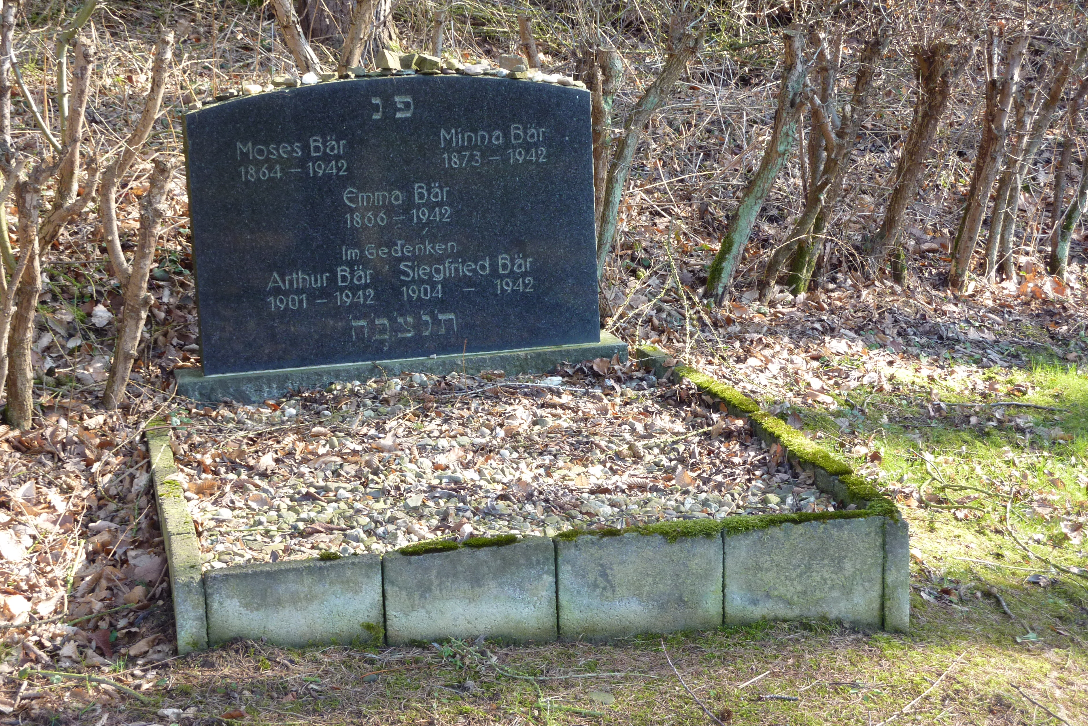 Jüdischer Friedhof Dernau, Grabstein der Familie Bär, Inschrift: "Moses Bär 1864-1942 Minna Bär 1873-1942 Emma Bär 1866-1942 Im Gedenken Arthur Bär 1901-1942 Siegfried Bär 1904-1942"